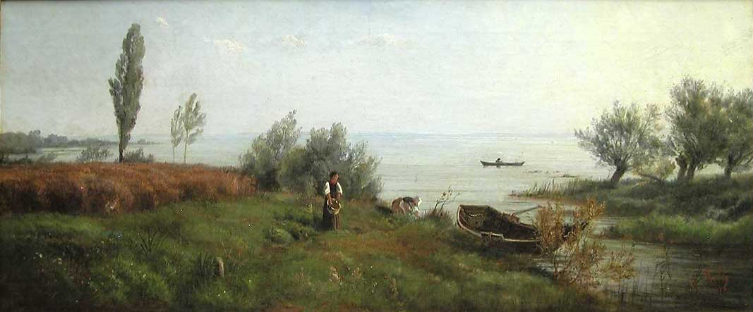 Ölbild von Elisabeth Kelly, 1876